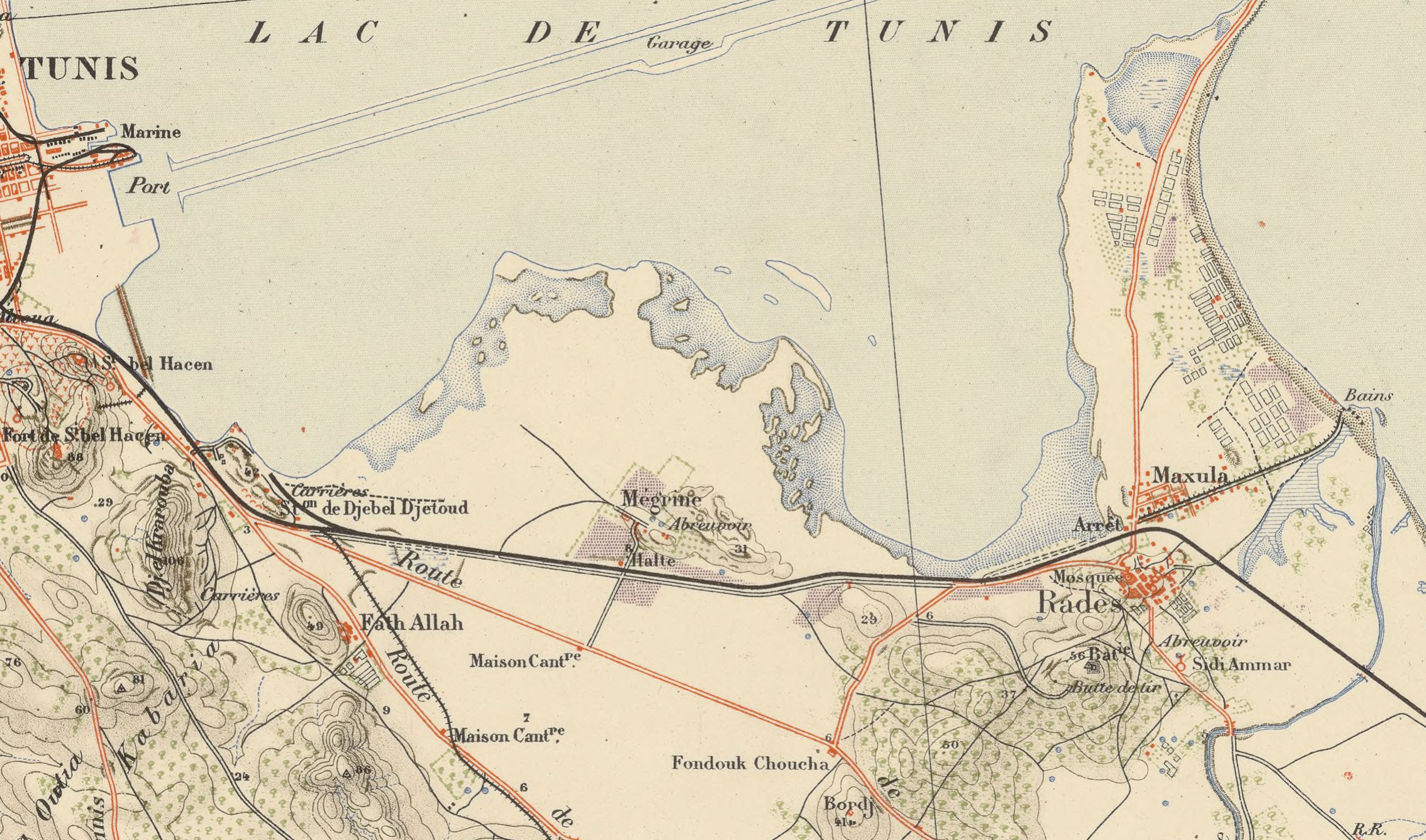 Détail de la carte des environs de Tunis : situation du domaine de Mégrine